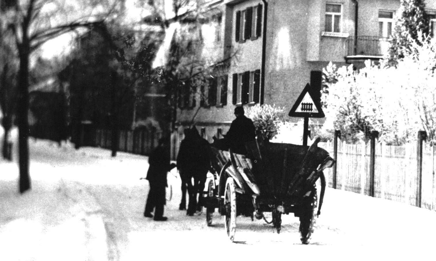 Der offene Müllabfuhrwagen in der Bahnhofsstraße von Burgkunstadt